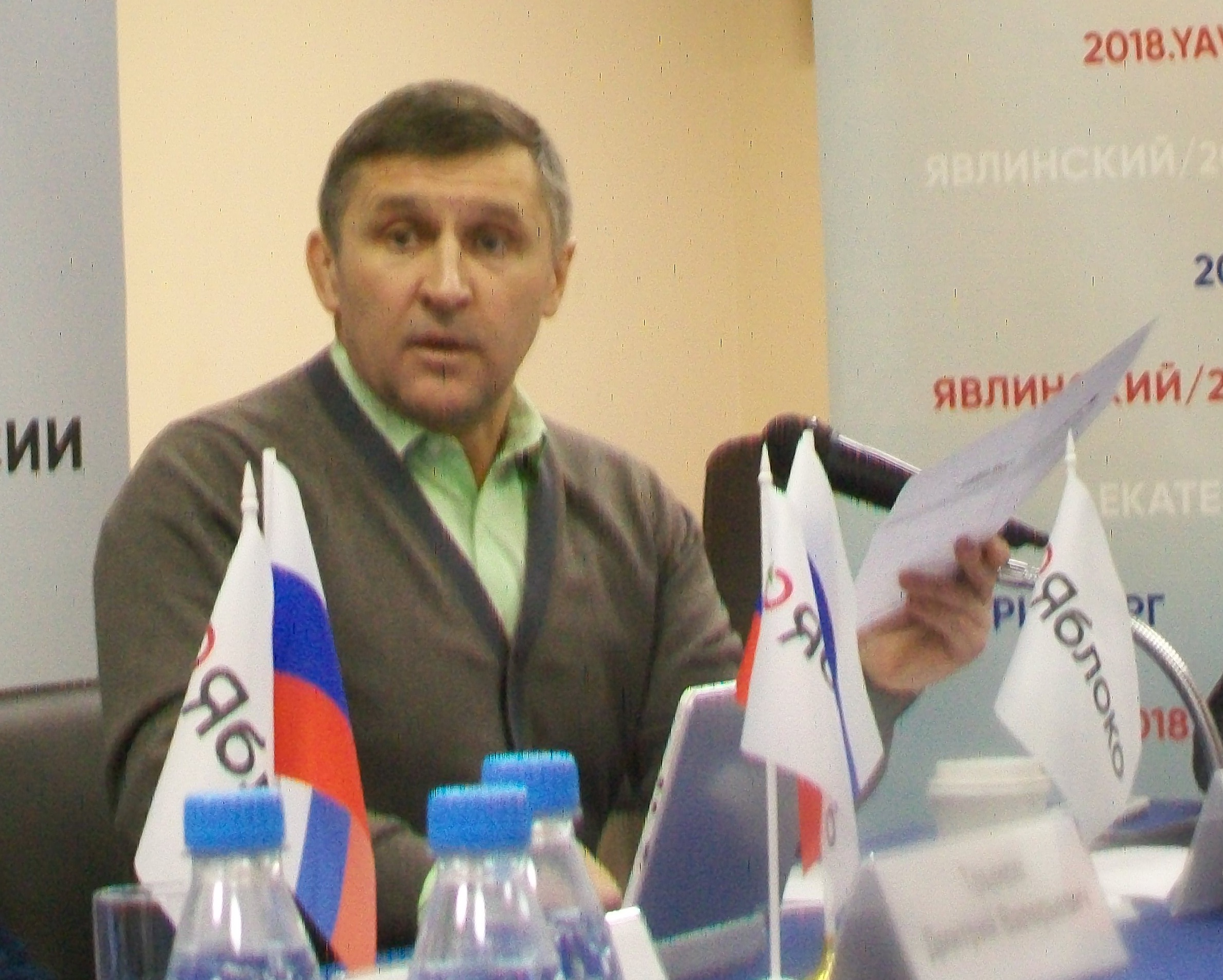 Евгений Артюх на конференции "Яблока" в Екатеринбурге. 12 декабря 2017 года